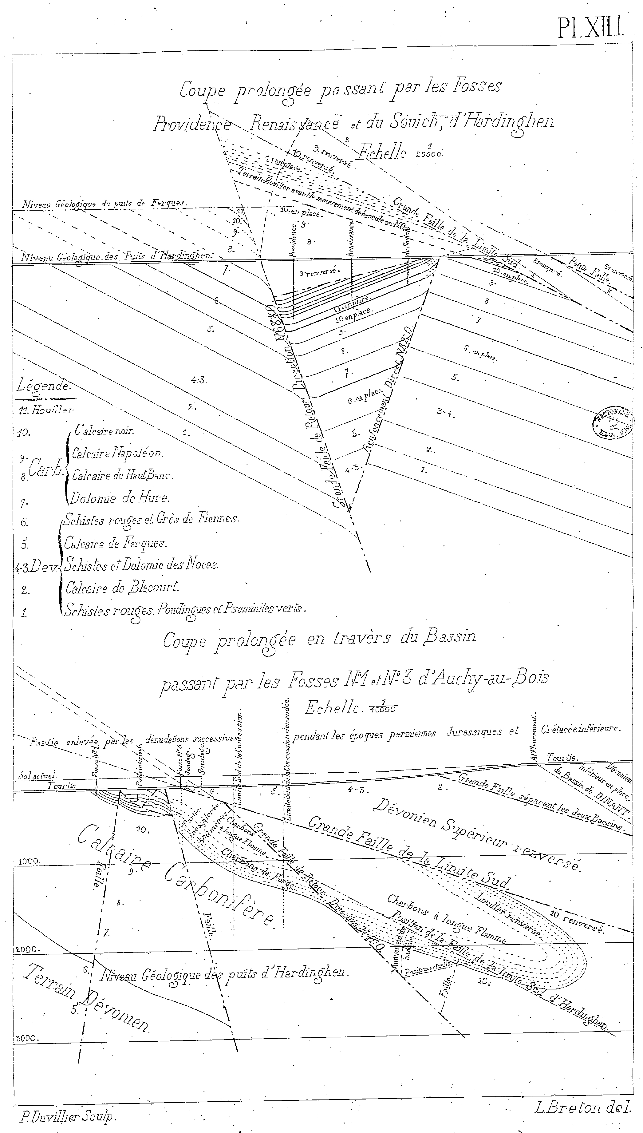 Compagnie des mines d'Auchy-au-Bois.